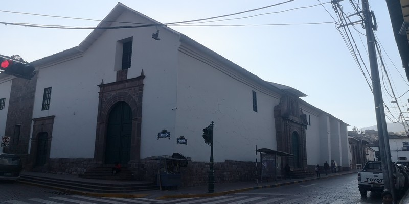 Vista de la antigua iglesia de San Juan de Dios, Cusco, Perú